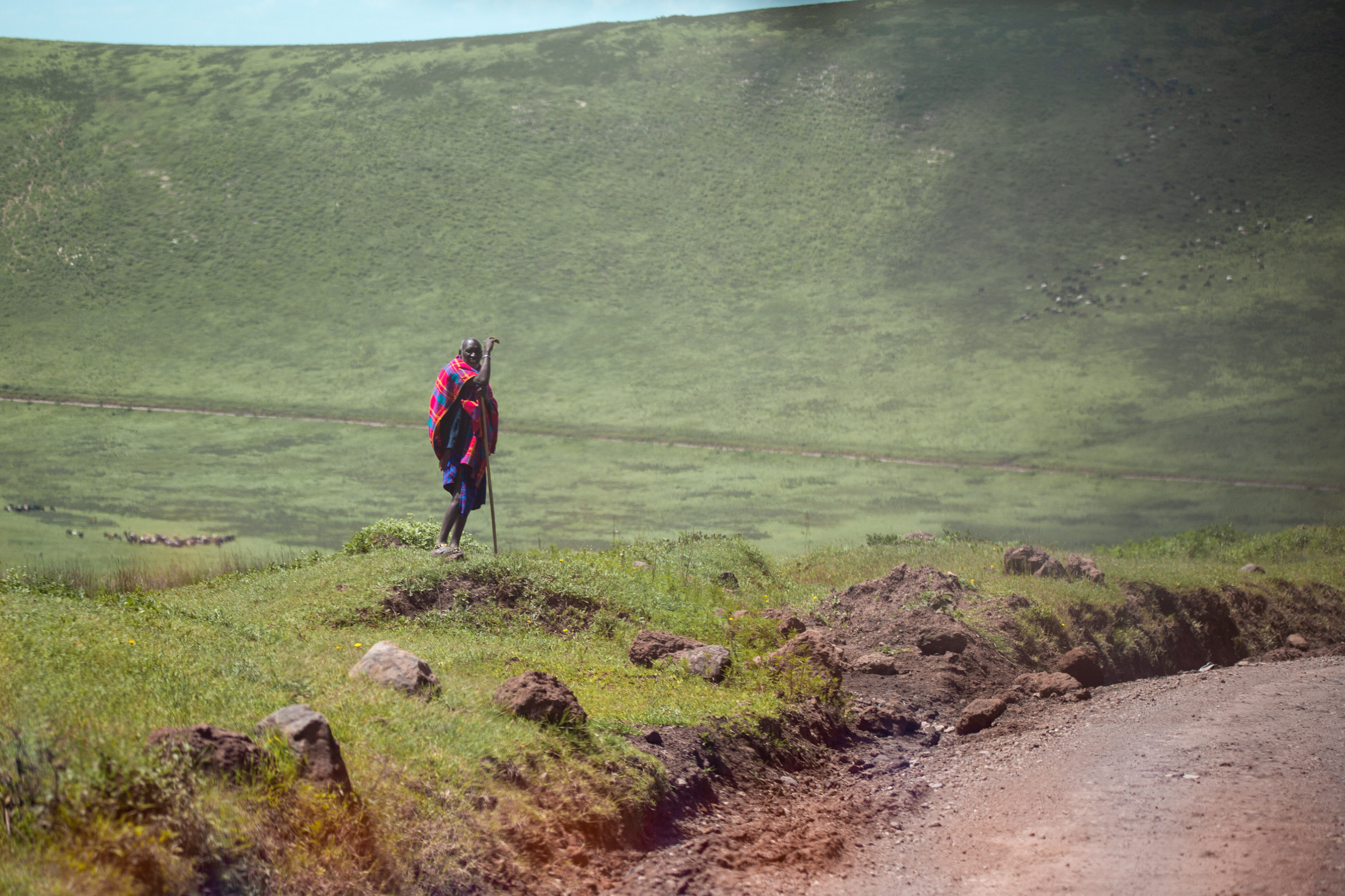 Un berger Masai contemple les véhicules qui redescendent du Ngorongoro This is an image with the theme "Africa on the Move or Transport" from: Tanzania